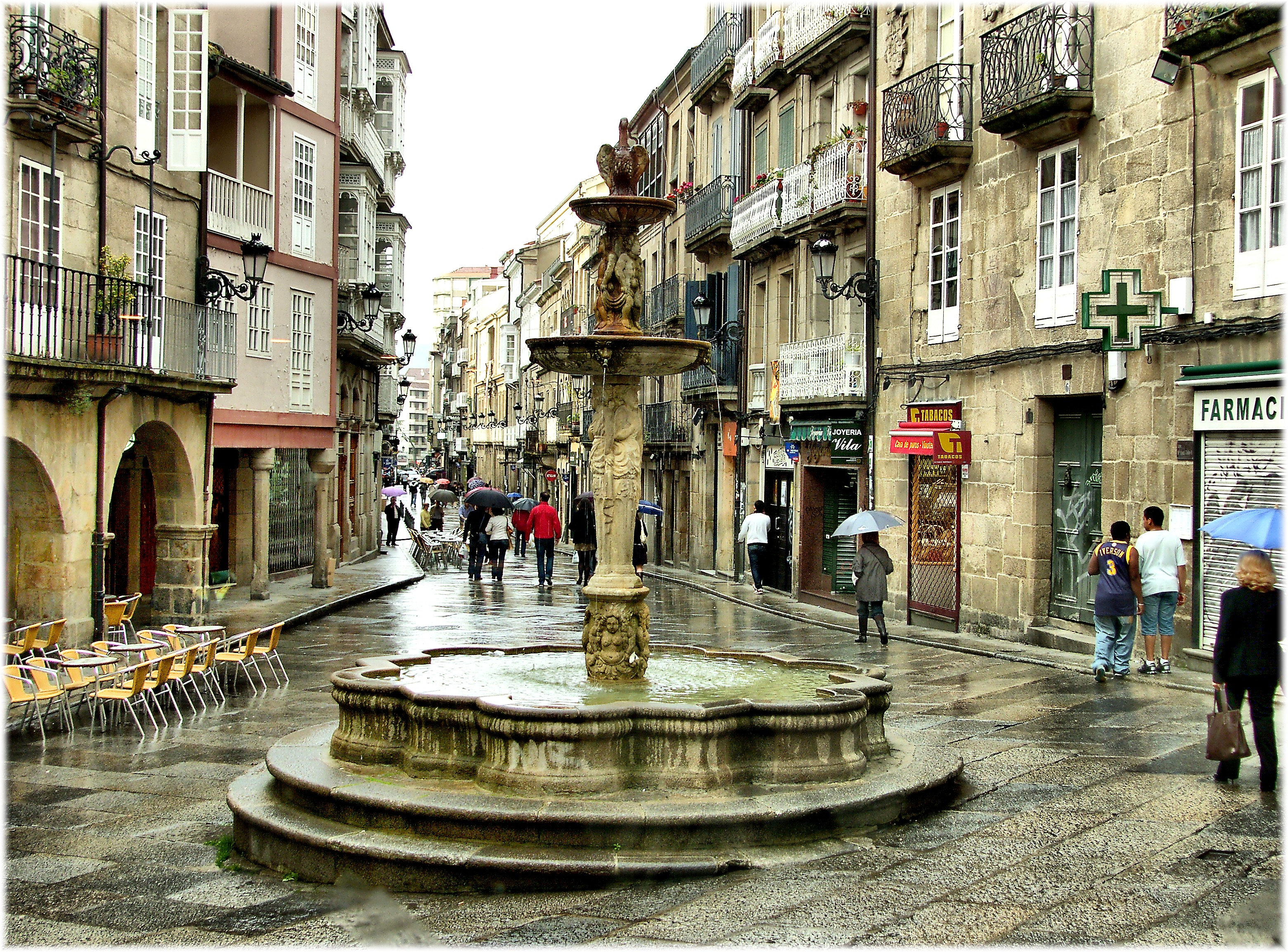 Praza do Ferro (Ourense)